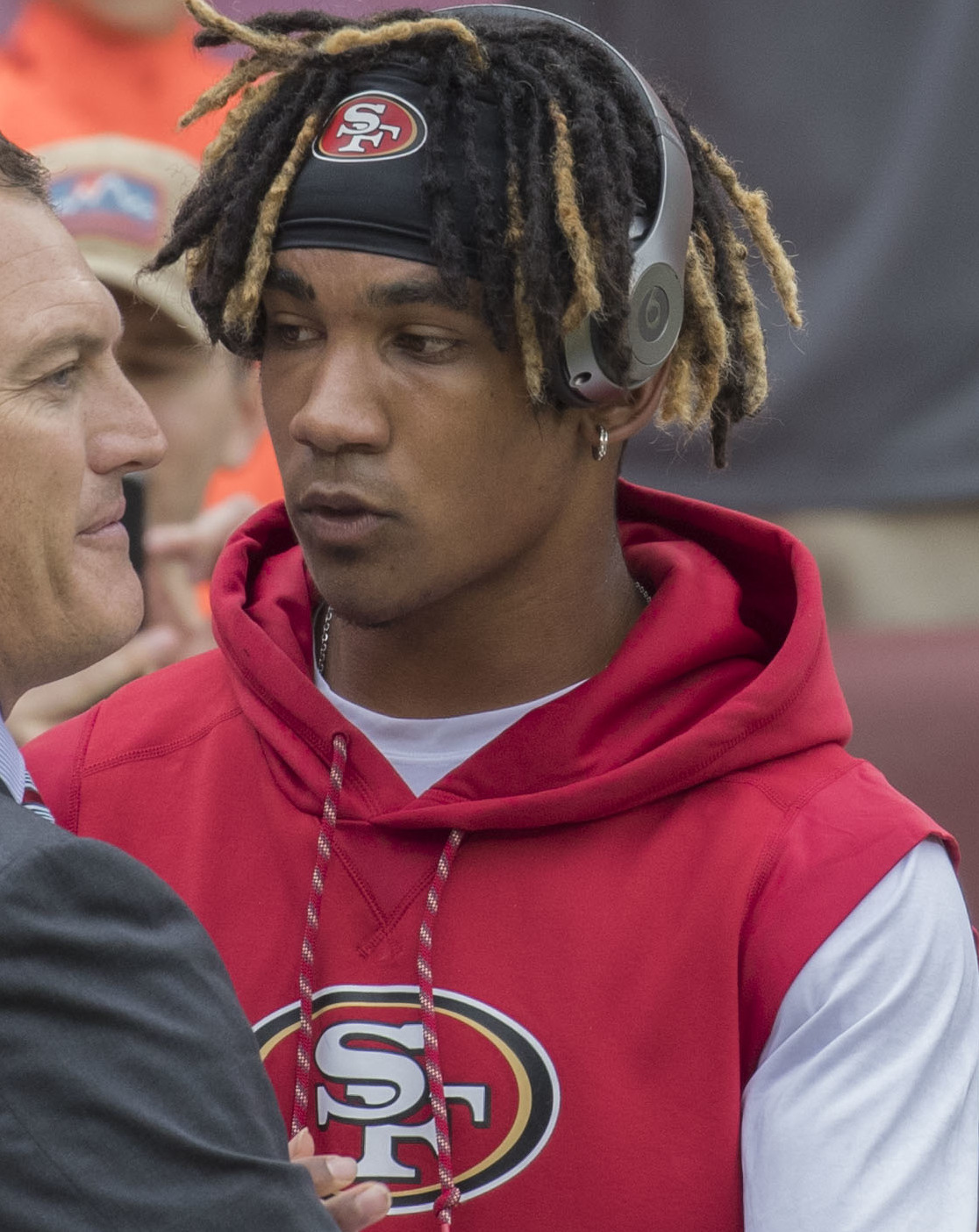 49ers at Redskins 10/15/17